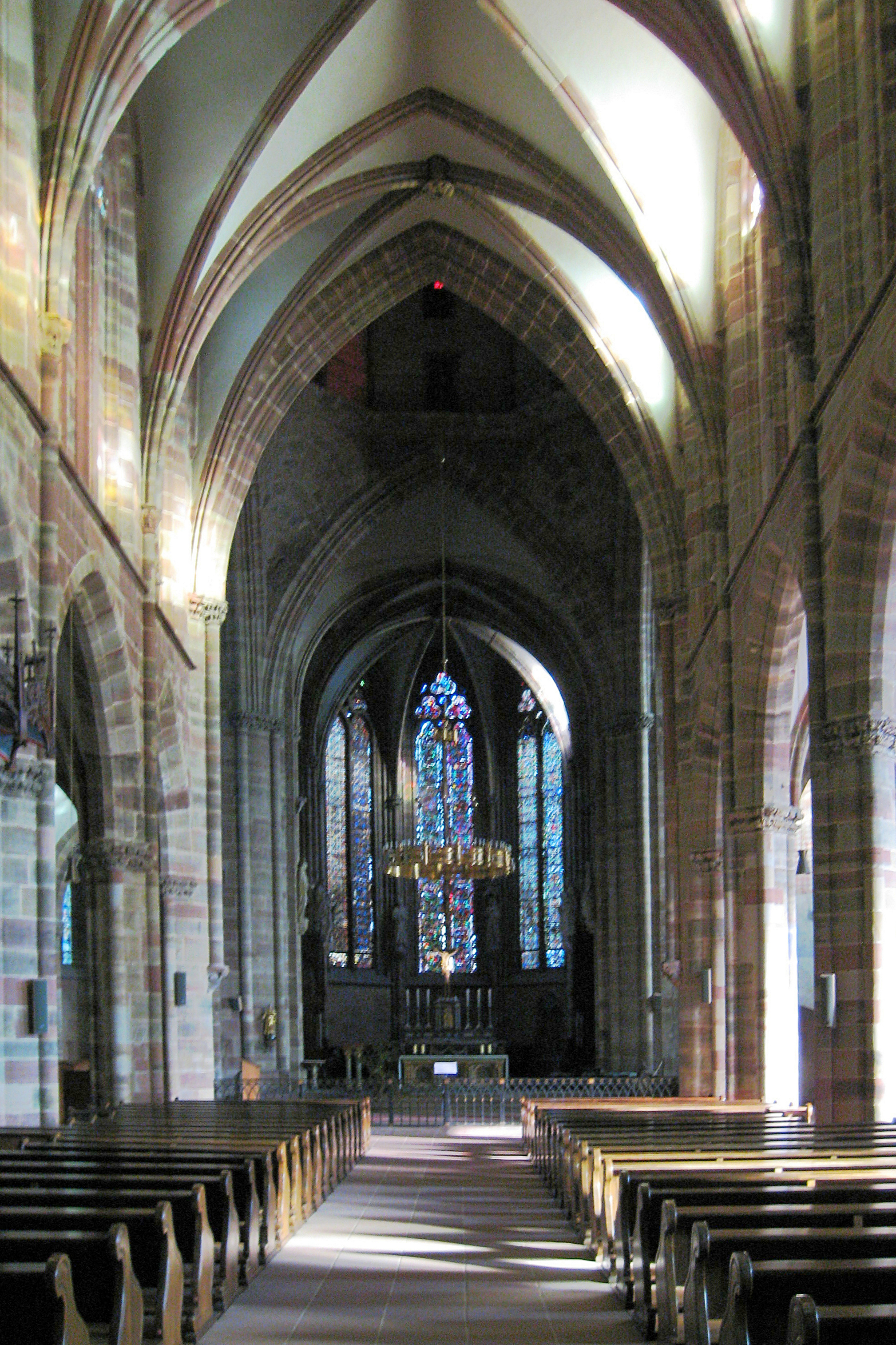 St. Peter und Paul (Wissembourg) - Innenansicht